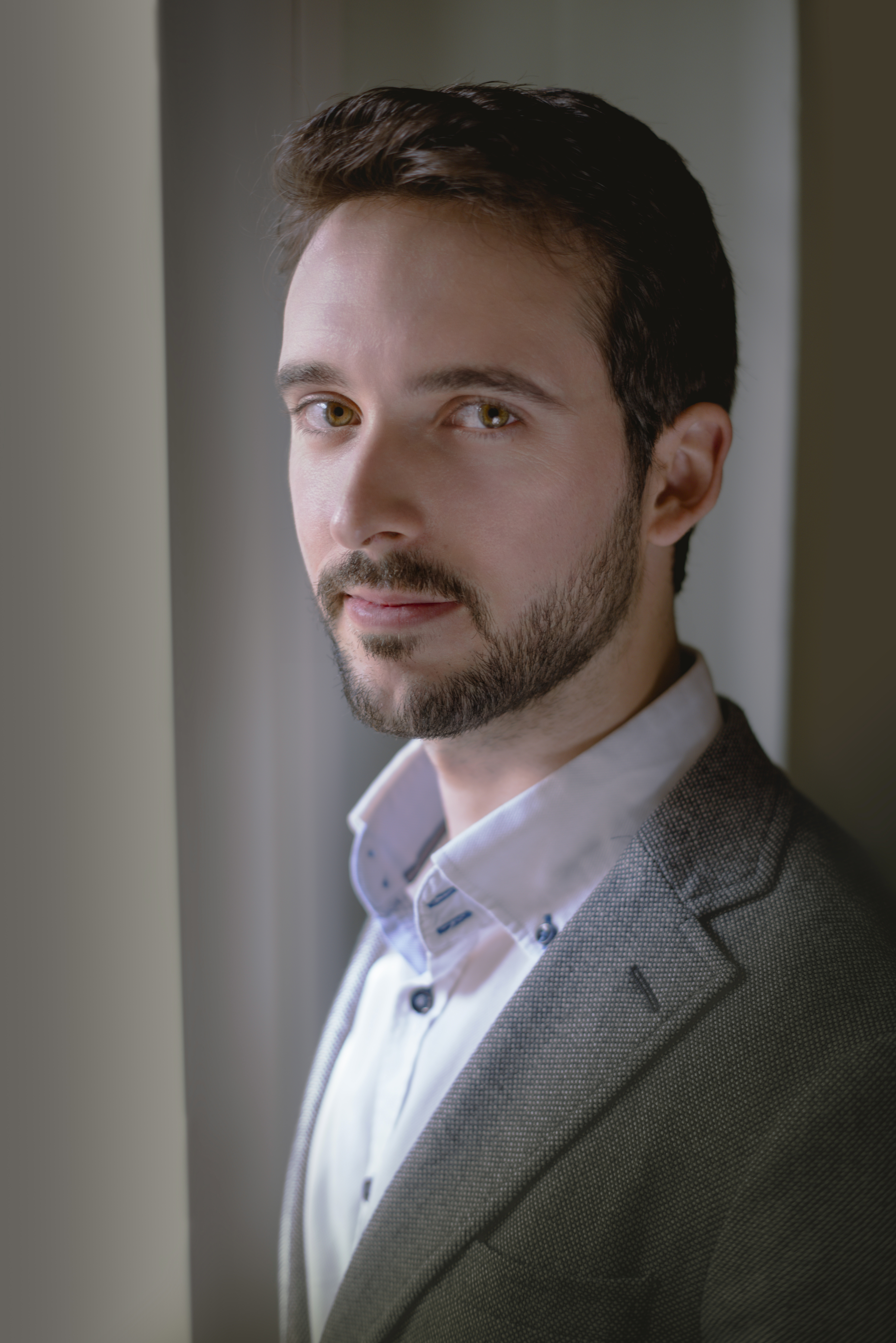 Foto